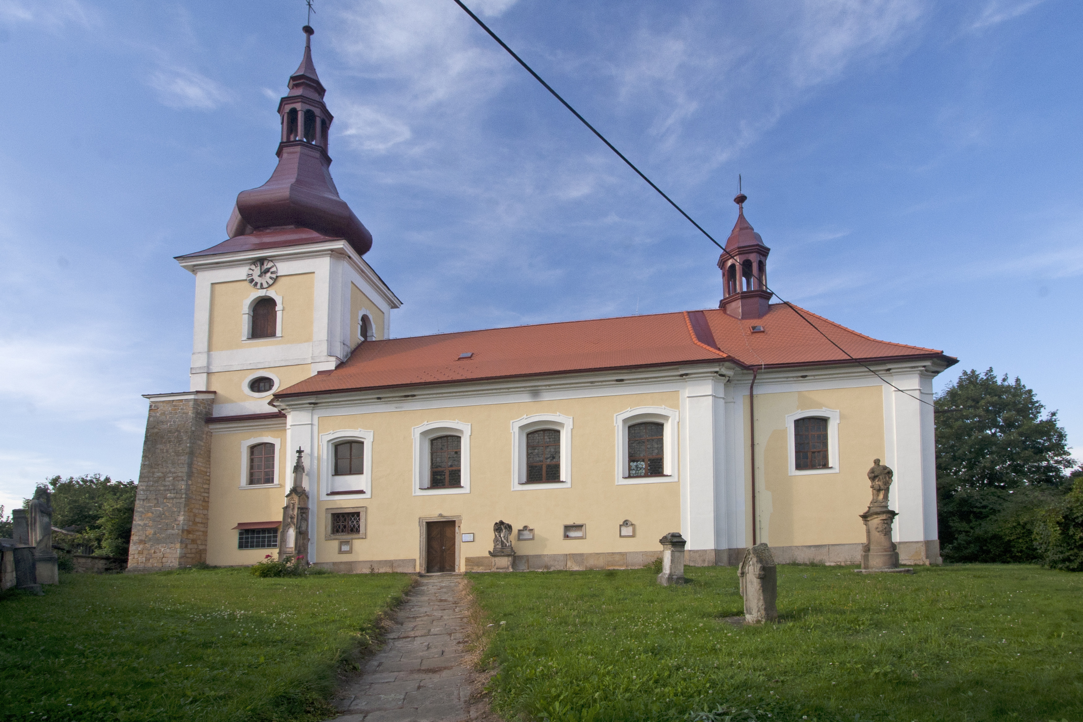 Kostel Nejsvětější Trojice (Mlázovice), Na Tvrzi, Mlázovice